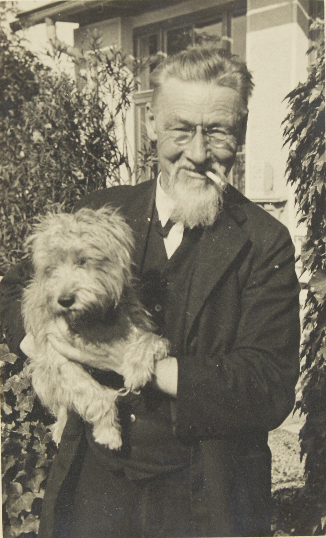 Jože Plečnik in njegov pes Sivko.